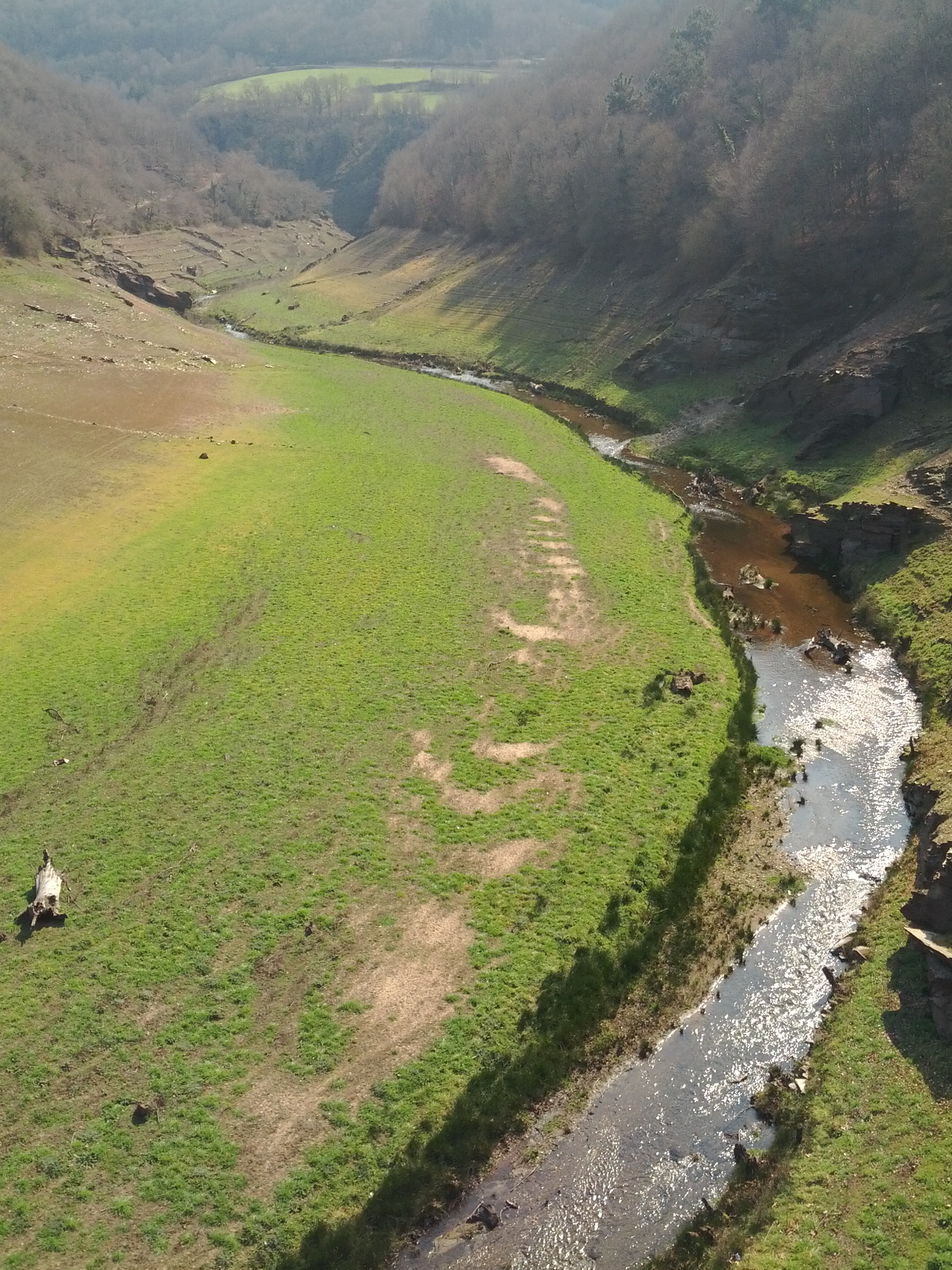 Río Loio